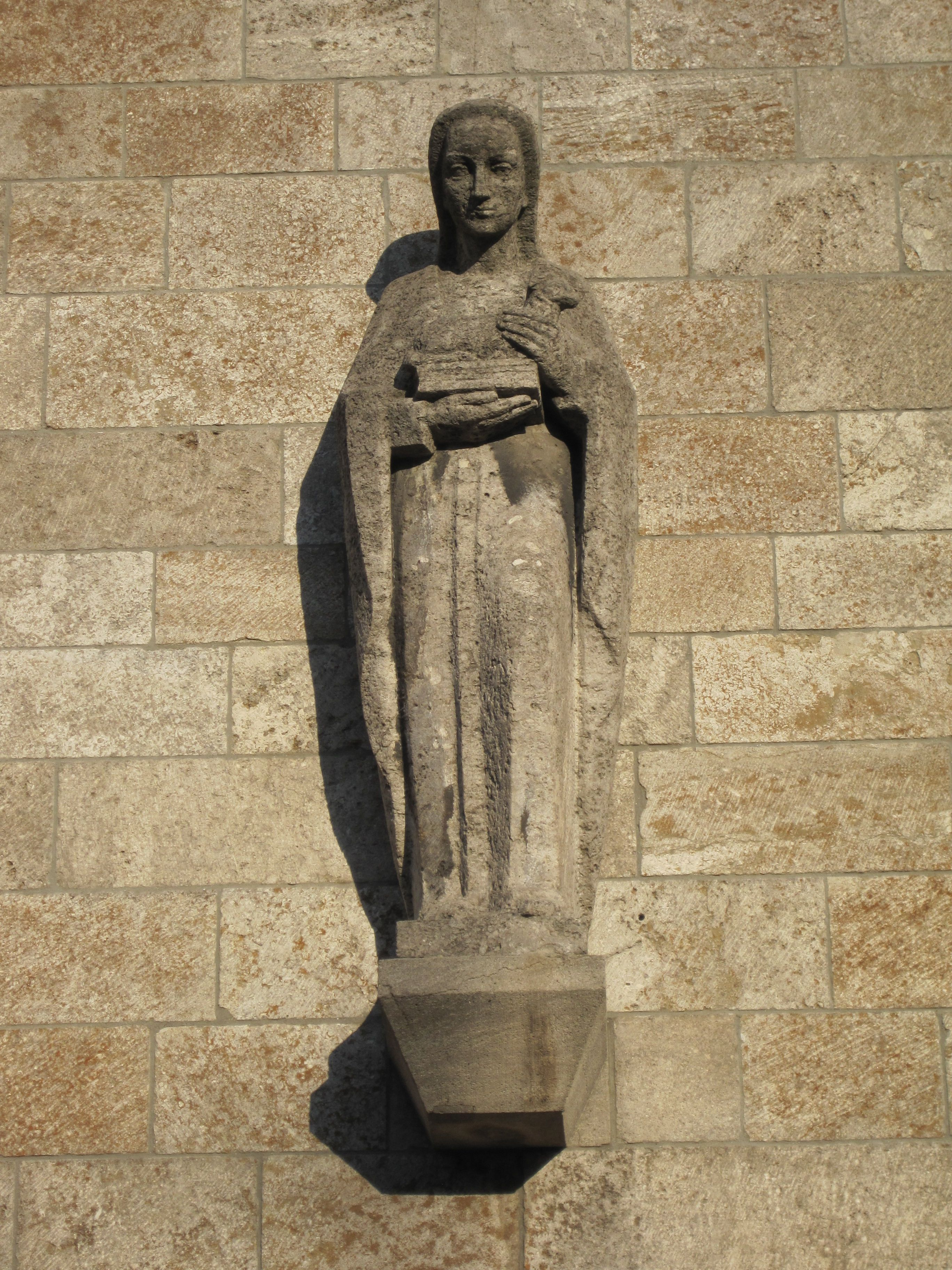 Das Foto zeigt die Statue der Heiligen Agnes über dem Eingangsportal der St. Agnes-Kirche in Hamm.